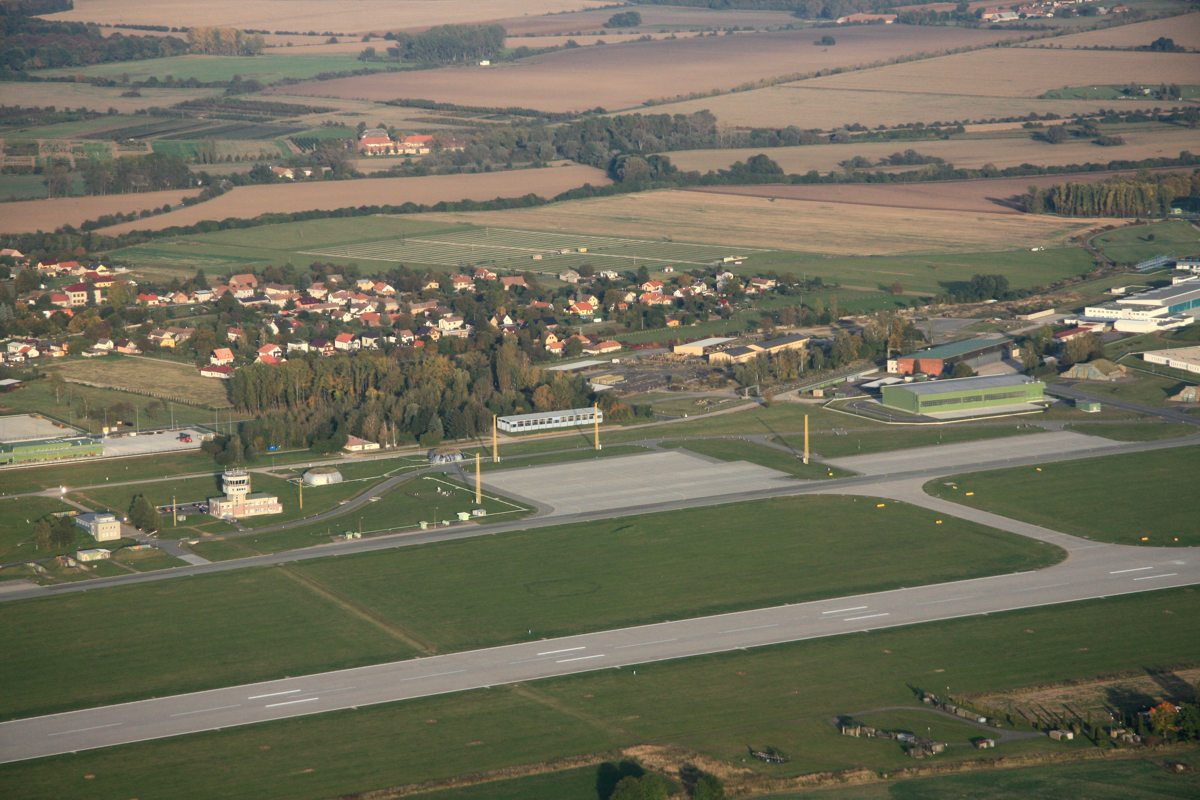 letiště Čáslav